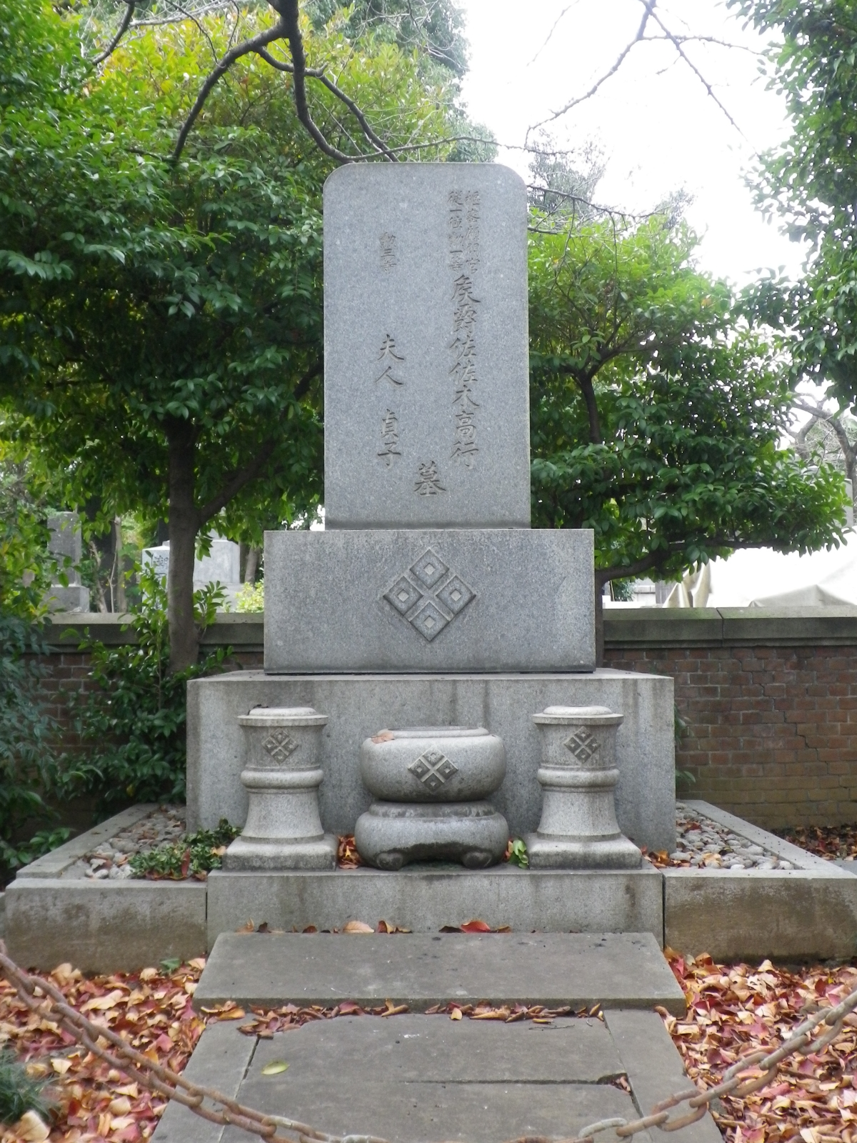 佐々木高行の墓